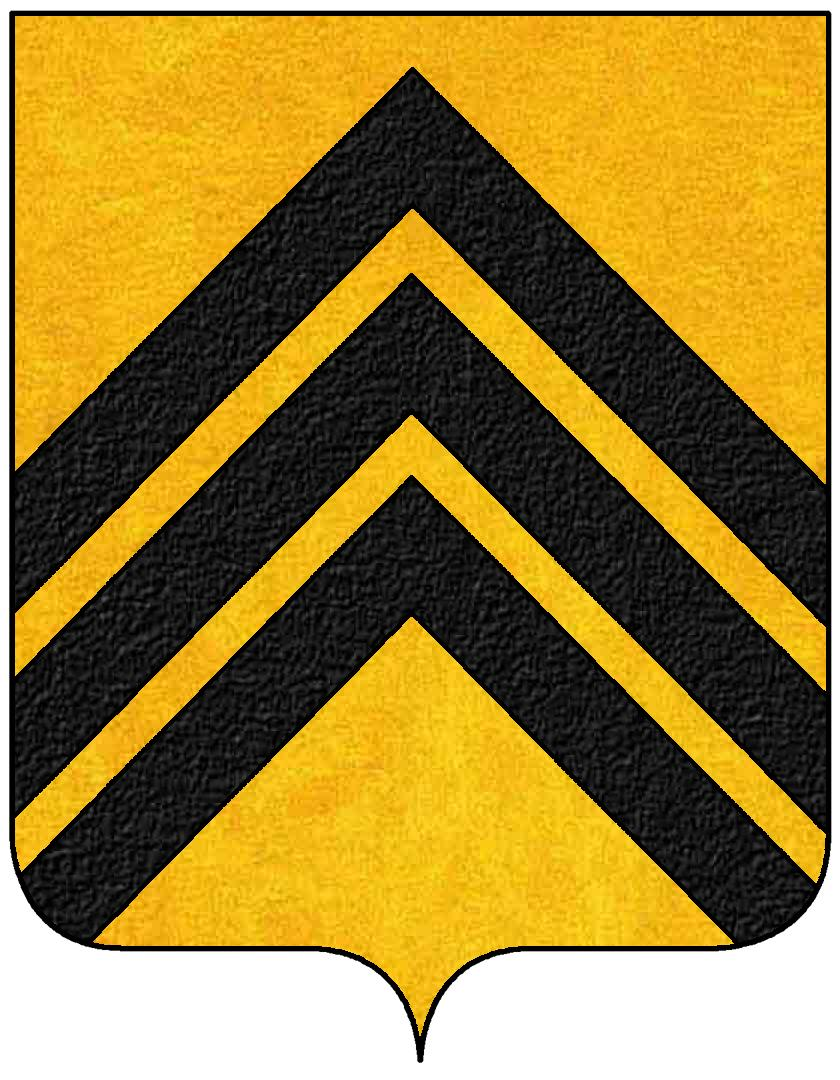 Stemma della famiglia Belforti